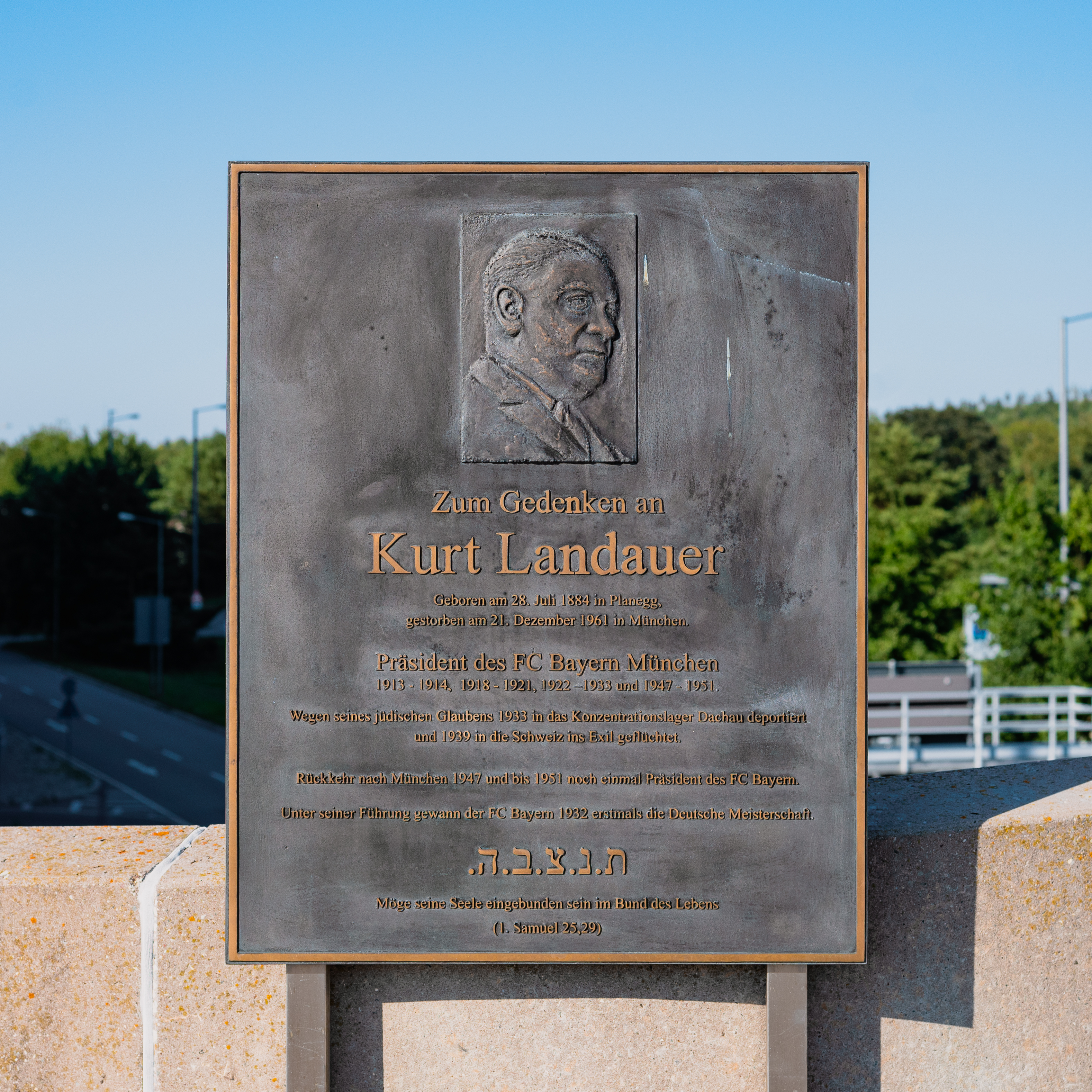 Die Gedenktafel an Kurt Landauer, einem ehemaligen Präsidenten des FC Bayern Münchens, an dem Kurt-Landauer-Platz vor der Allianz Arena.